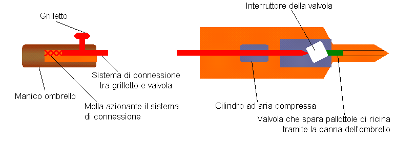 Diagramma del meccanismo di innesco dell'ombrello usato per assassinare il dissidente bulgaro Gheorghi Markov.